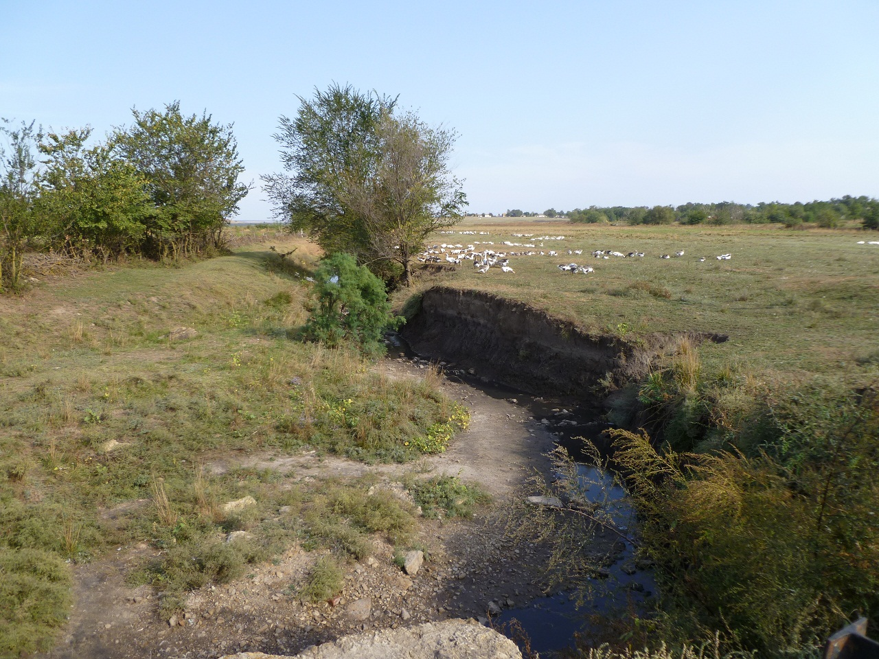 Река Ягурка в верхнем течении